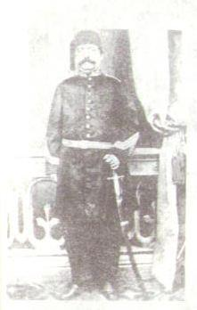 Марко Павлов като лекар на пашата